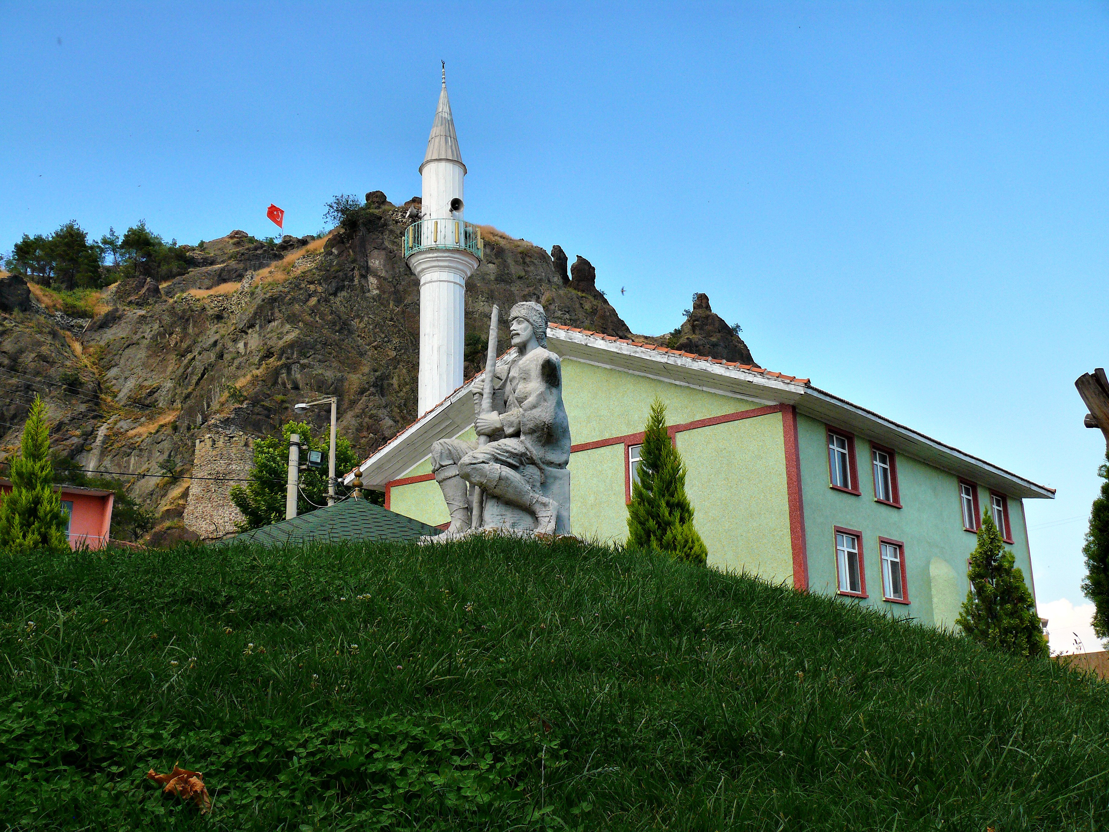 Koyunbaba ve Kalekapisi Camii